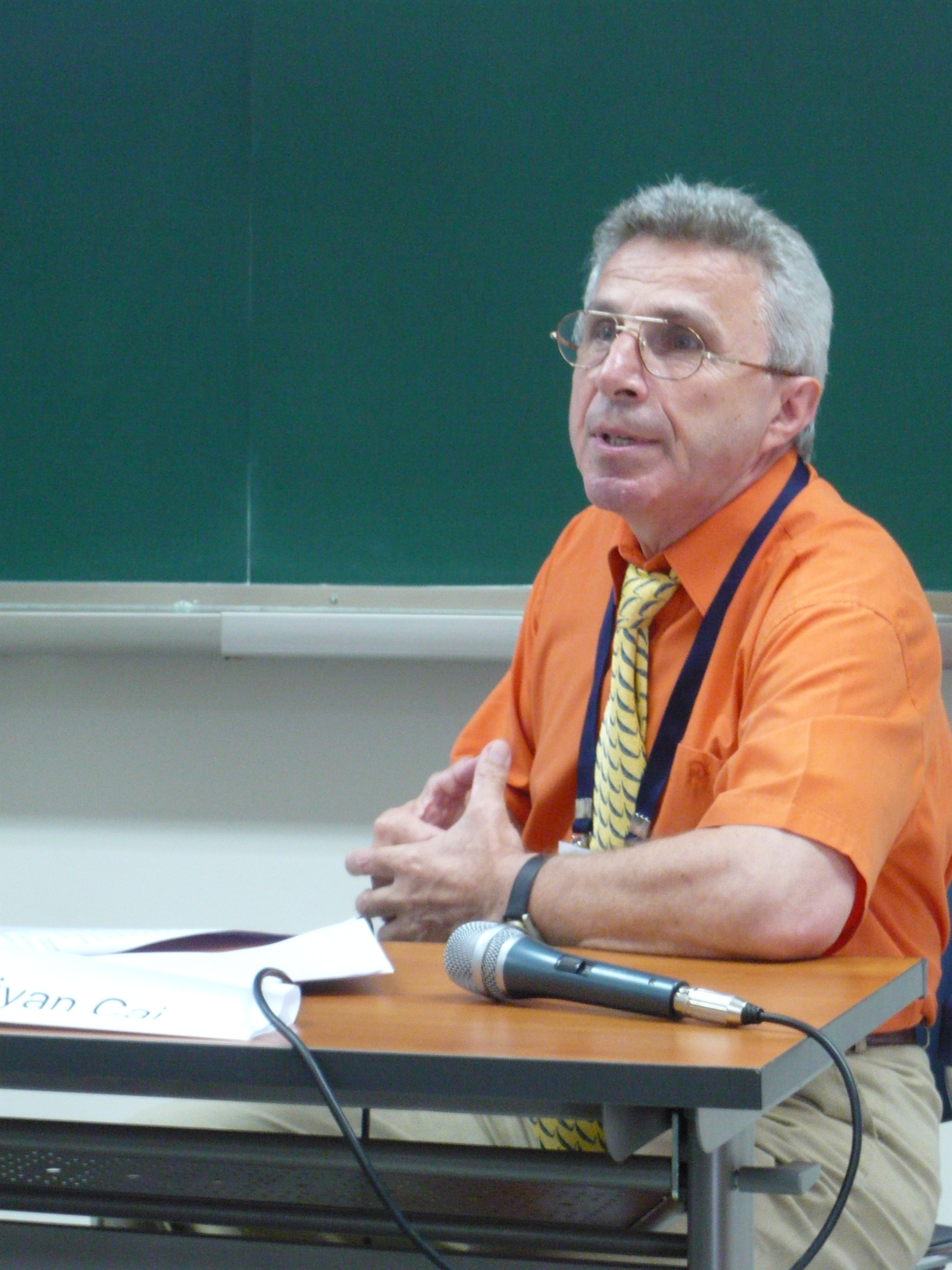 Ioan Biris, Prezentare la Congresul de filosofie de la Seul 2008